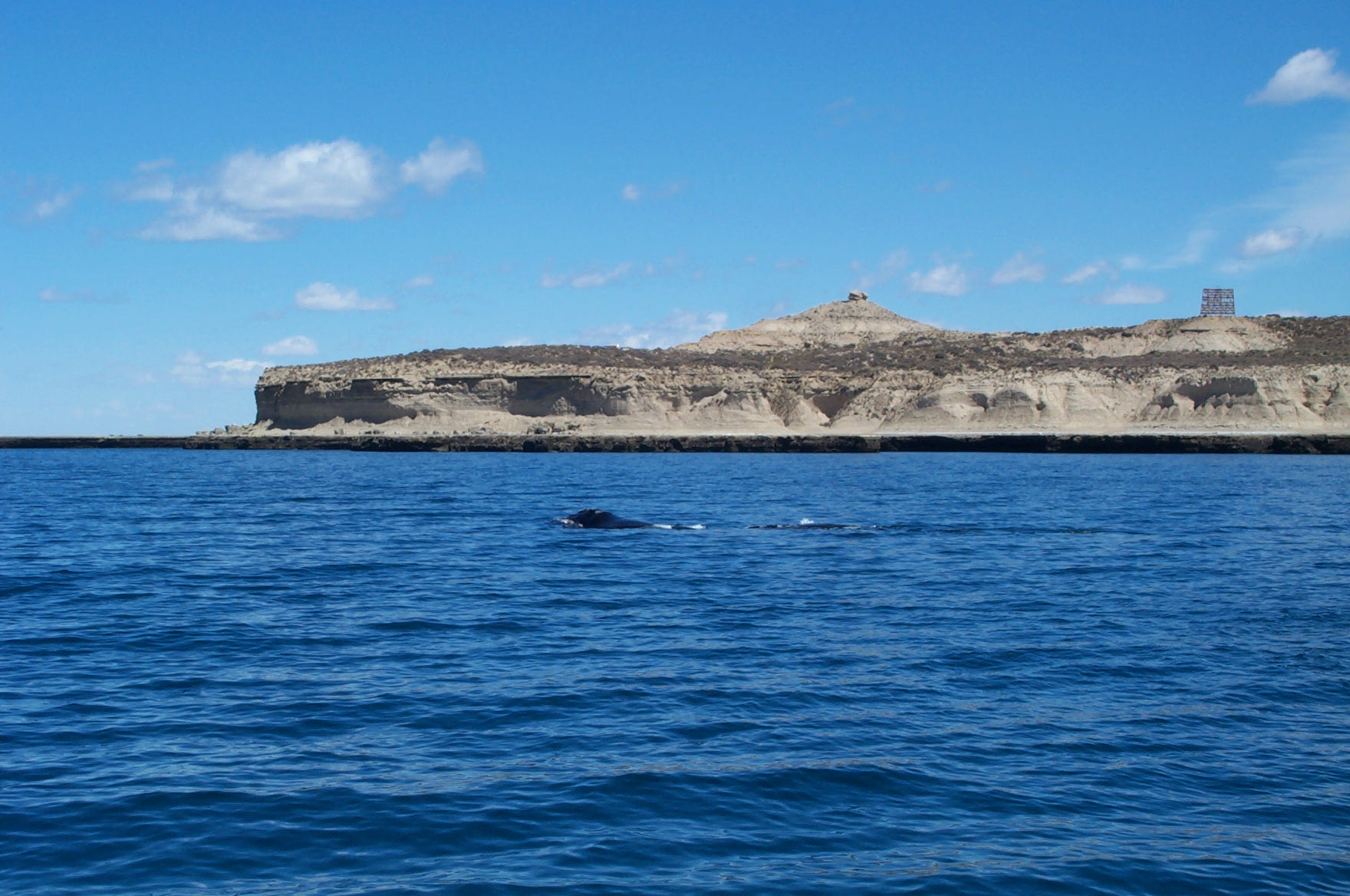 Ballena en Peninsula Valdes